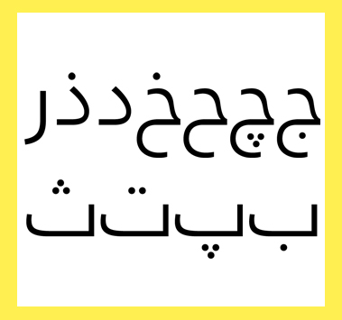 Mostra de Frutiger Arabic